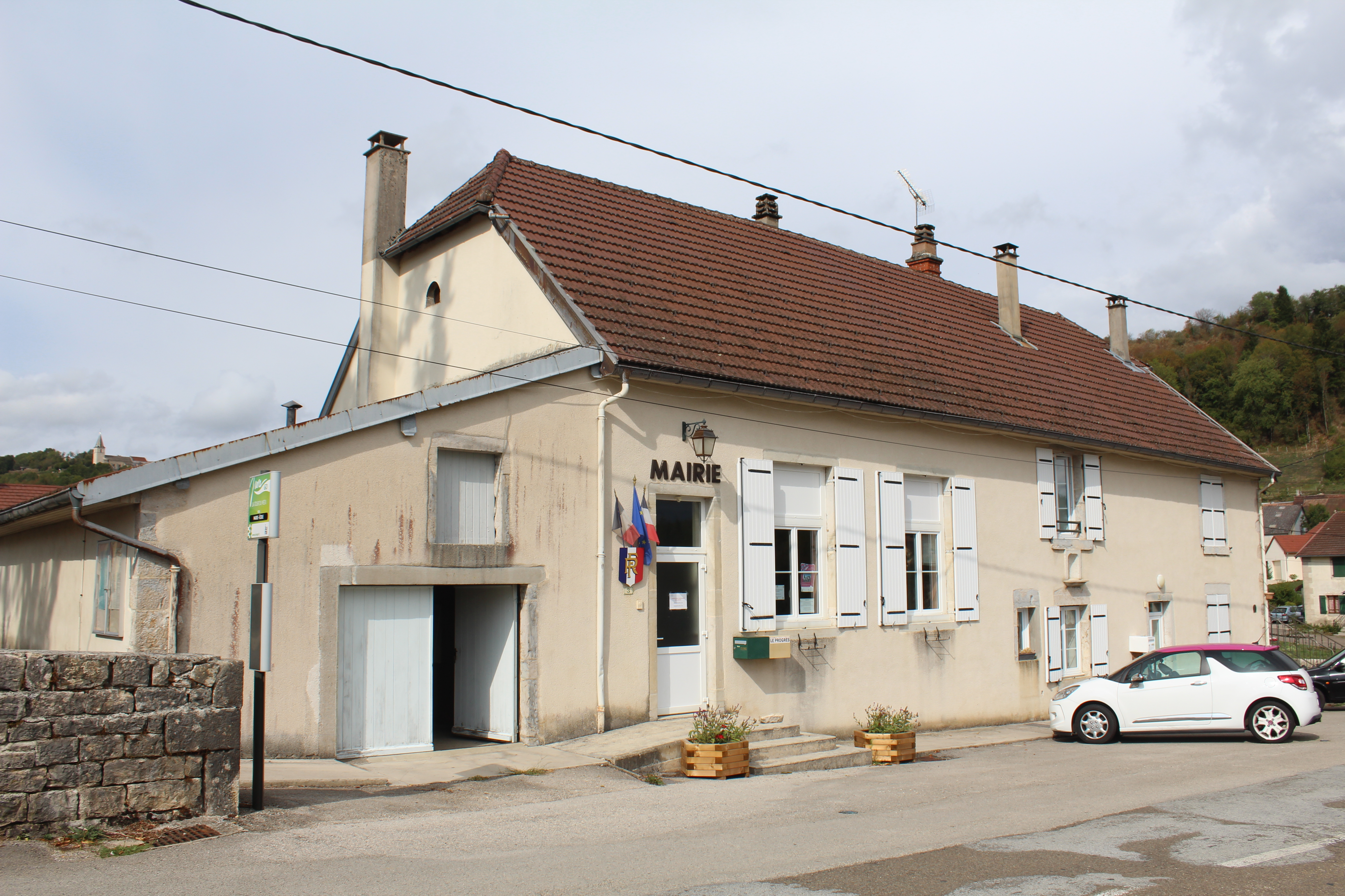 Mairie de La Tour-du-Meix.